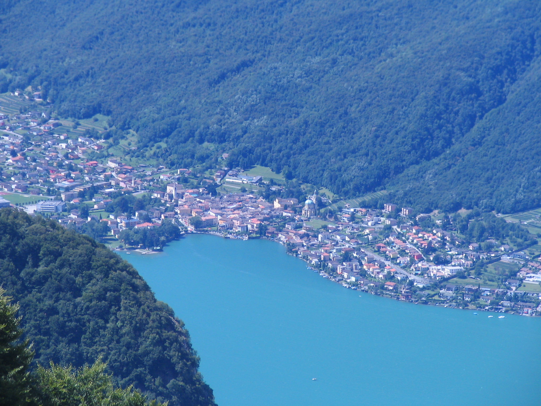 Riva San Vitale und der Lago di Lugano (Schweiz) vom Monte Generoso aus gesehen